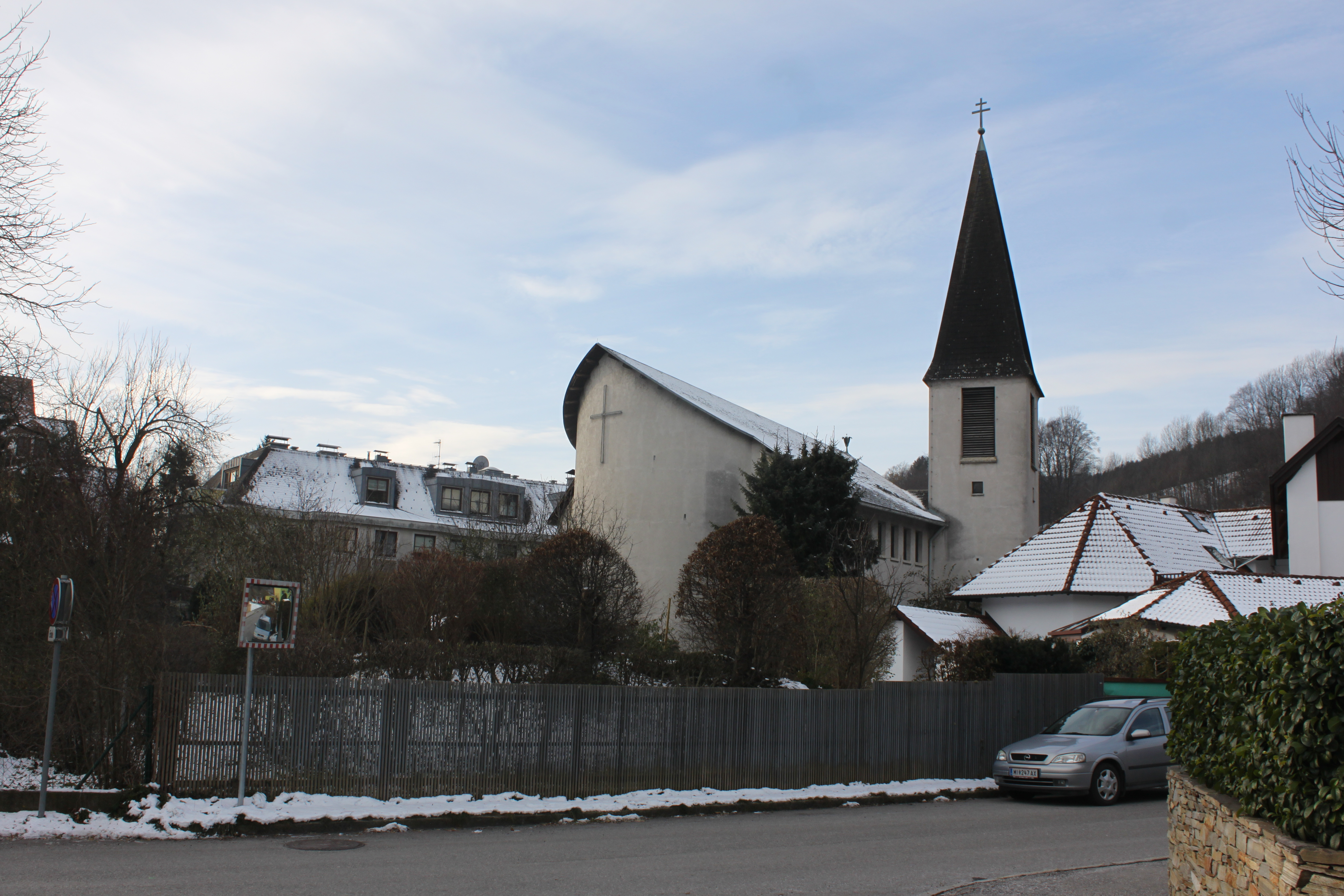 Kath. Filialkirche hl. Josef der Arbeiter